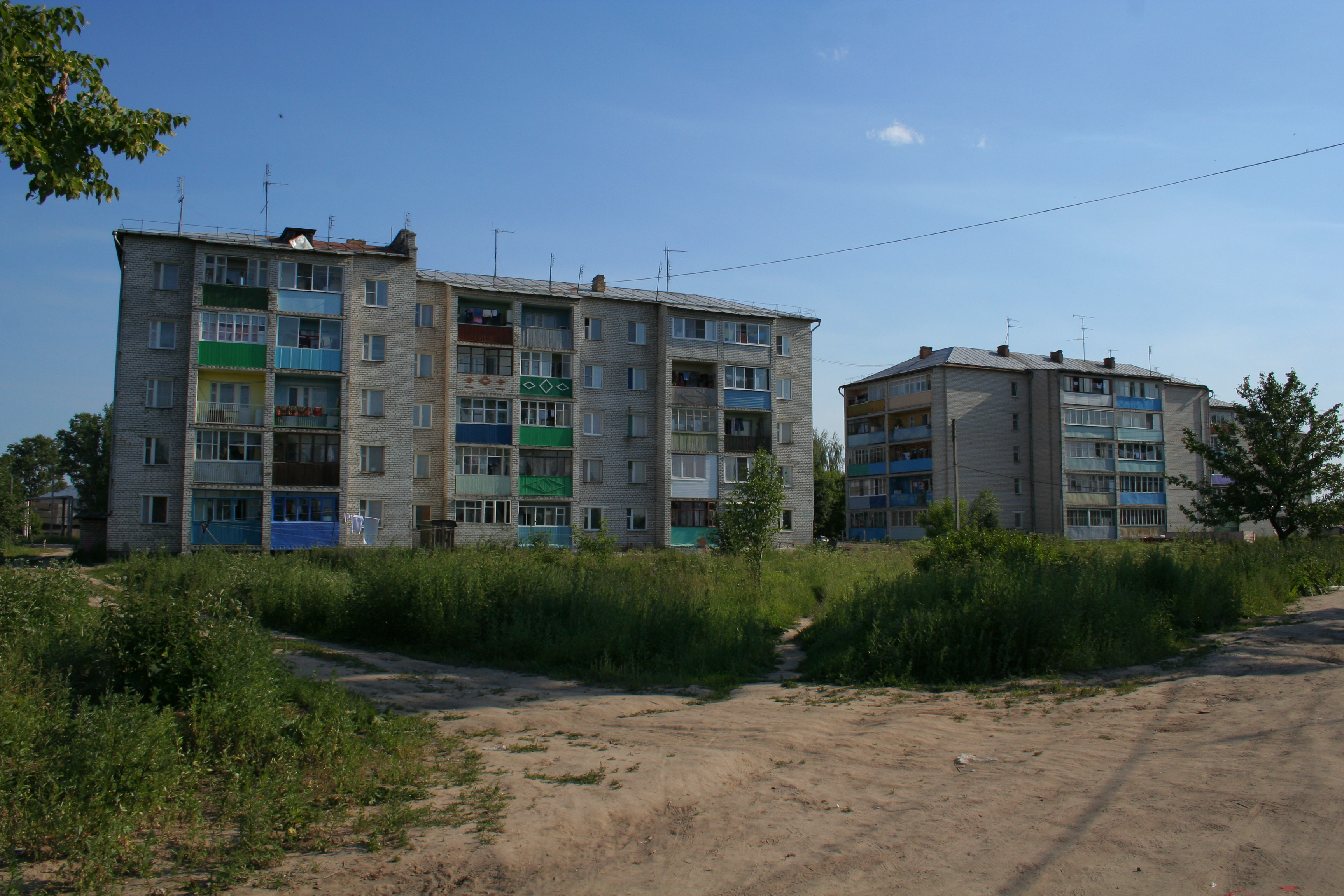 Wohnhäuser in Kosterjowo, Oblast Wladimir, Russland.